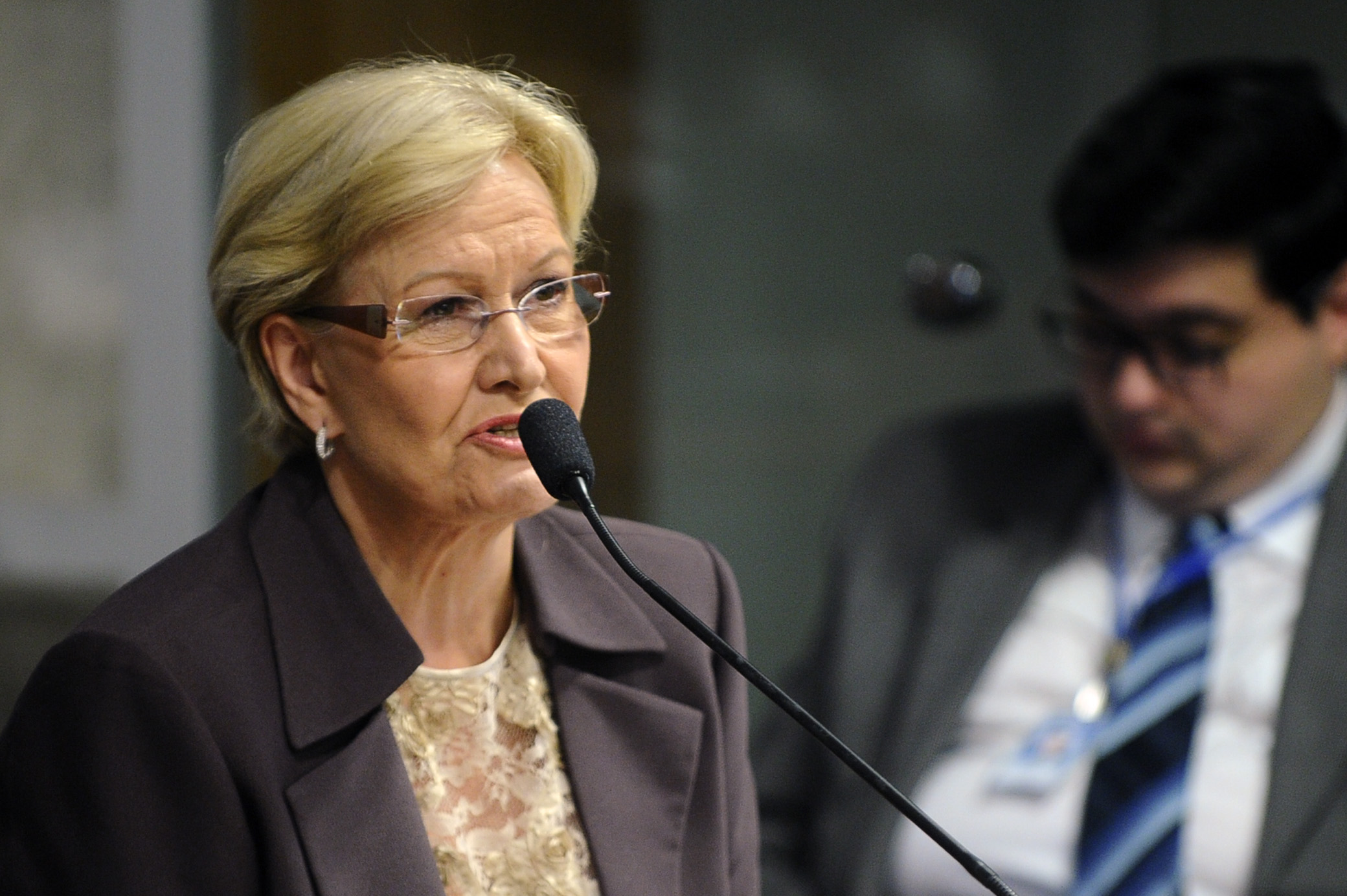 Comissão de Relações Exteriores e Defesa Nacional (CRE) realiza audiência para debater a situação política e econômica na Em pronunciamento, senadora Ana Amélia (PP-RS) Foto: Marcos Oliveira/Agência Senado